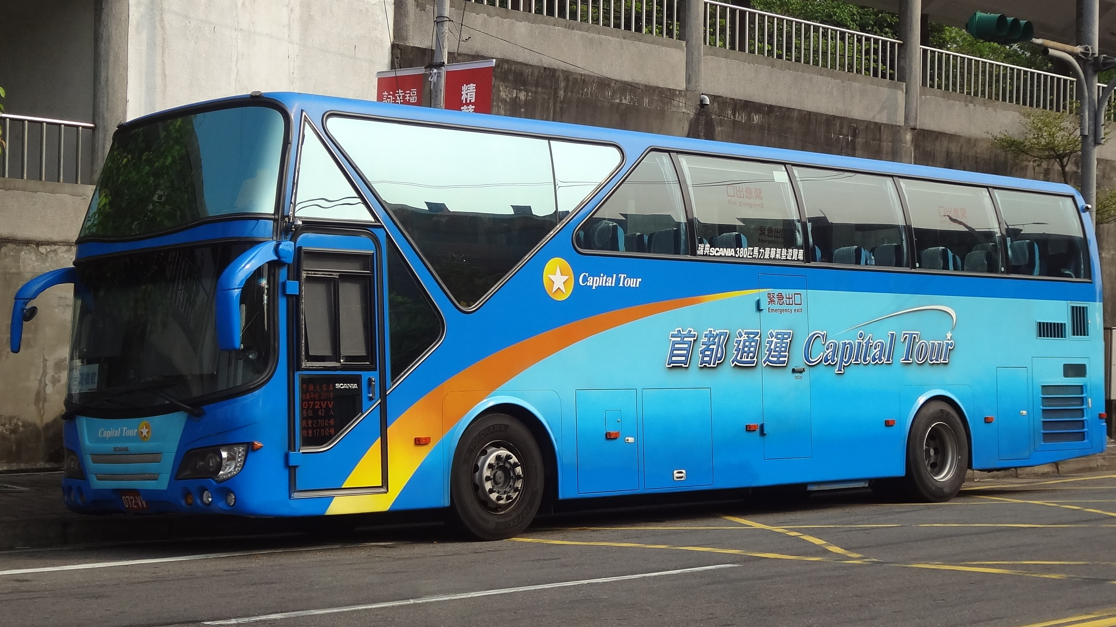 首都通運的Scania K380遊覽車072-VV左側外觀。